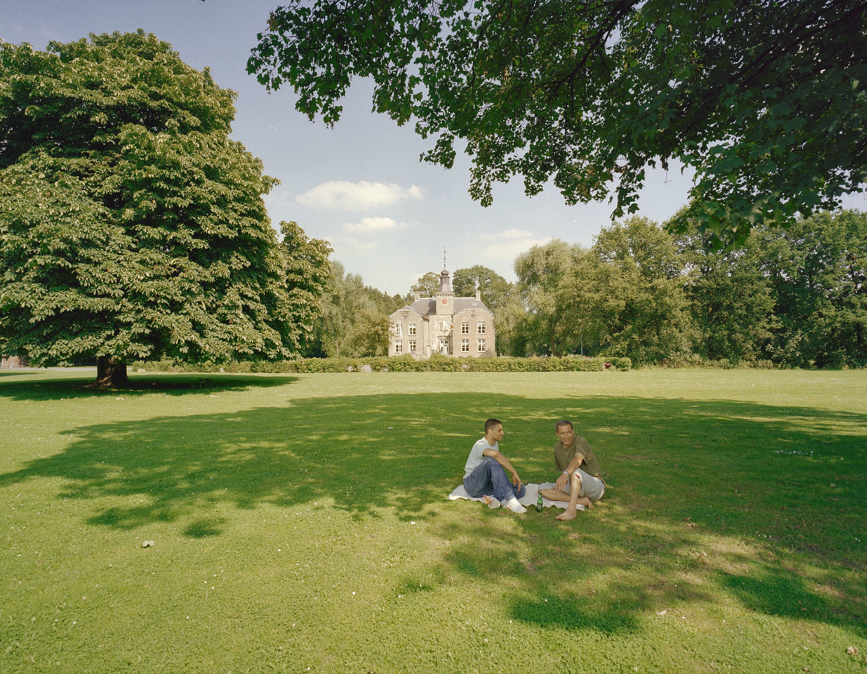 De Geusselt: Overzicht met omgeving (opmerking: Gefotografeerd voor Kastelen in Limburg (1000-1800), Burchten en landhuizen, bladzijde 356)